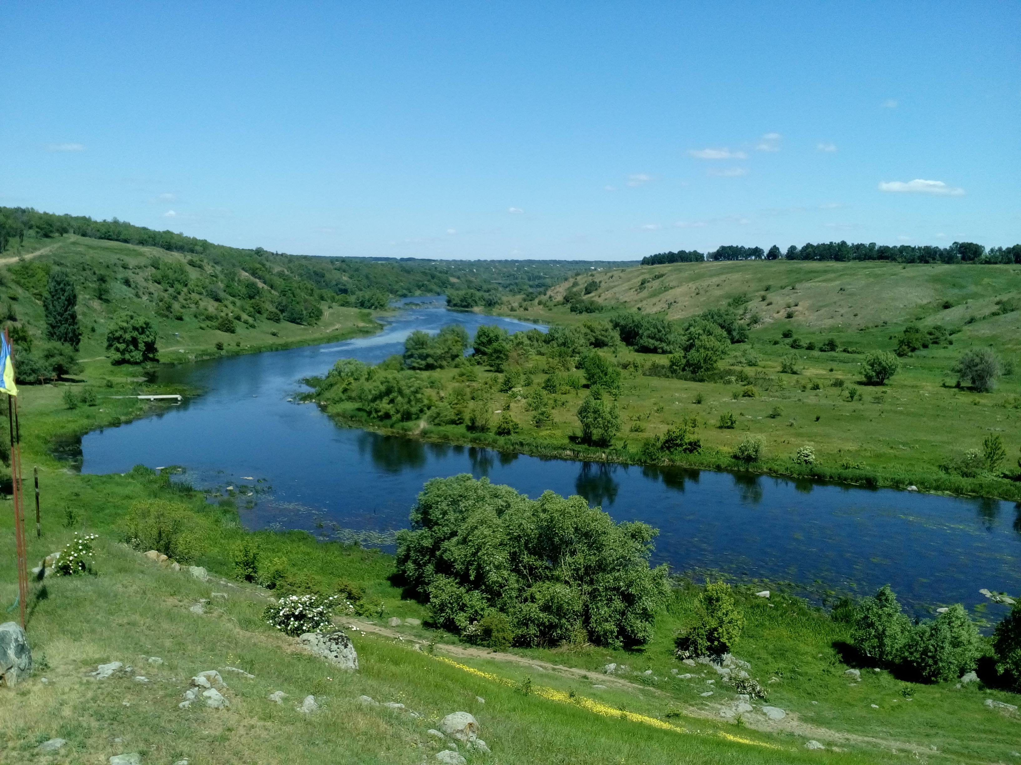 «Казавчинські скелі», Гайворонський район с. Казавчин